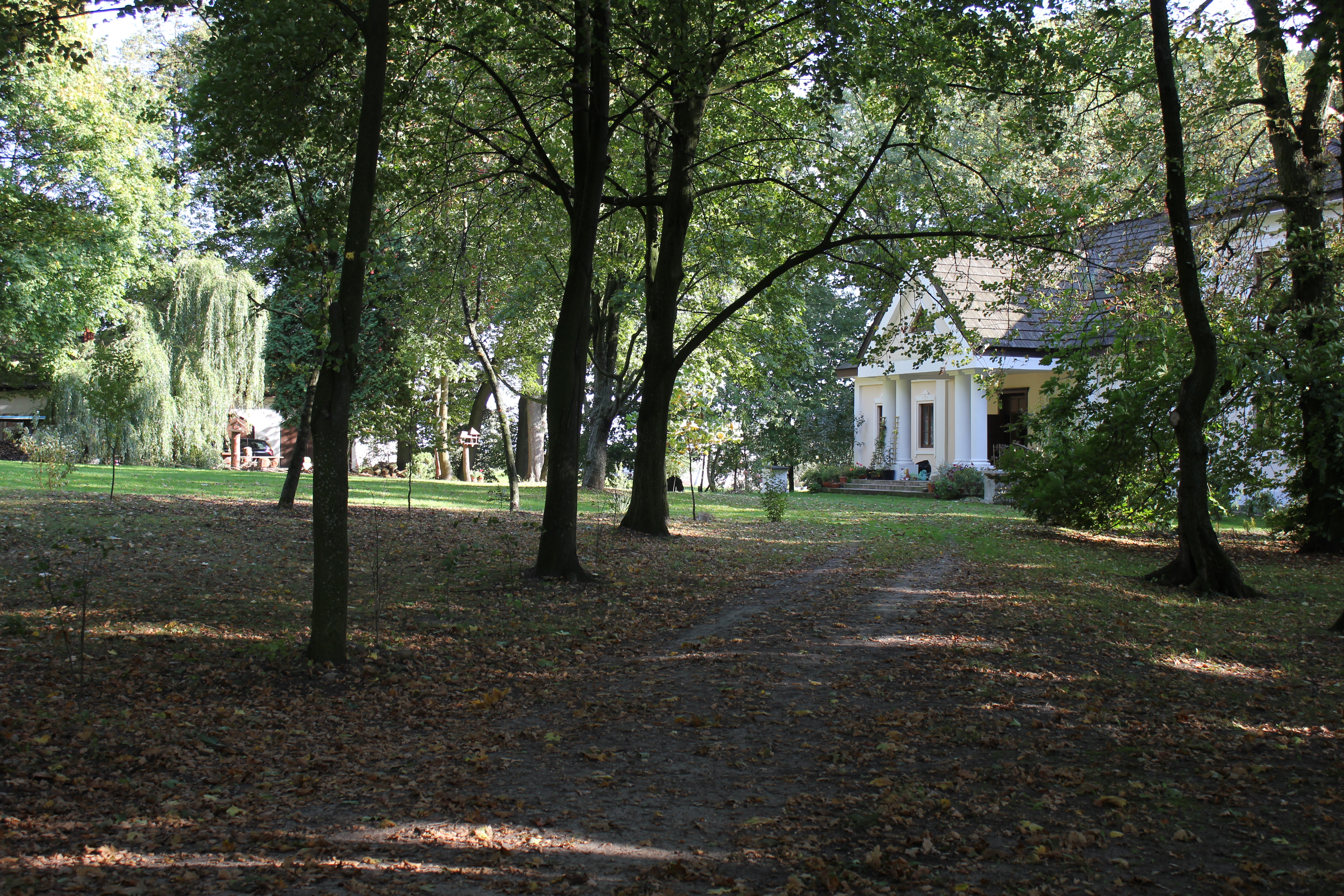 Waliska (powiat miński), park dworski, 2 poł. XIX Nr ID zabytku 621798